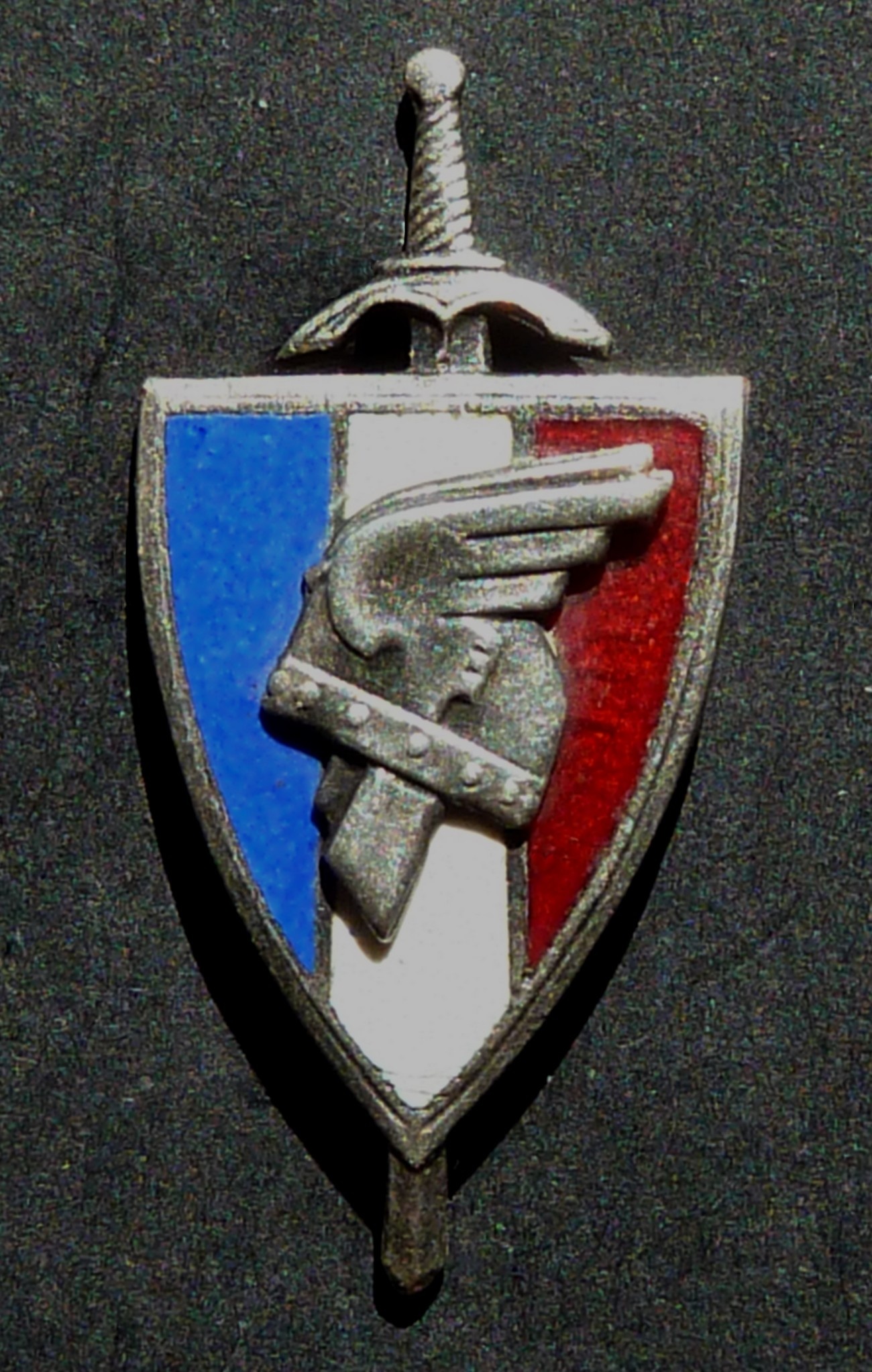 Insigne de boutonnière de la Ligue Française des Combattants, vers 1942, fabrication J.Decat, Brest, Vichy. Argent et émail, hauteur 2,5 cm.